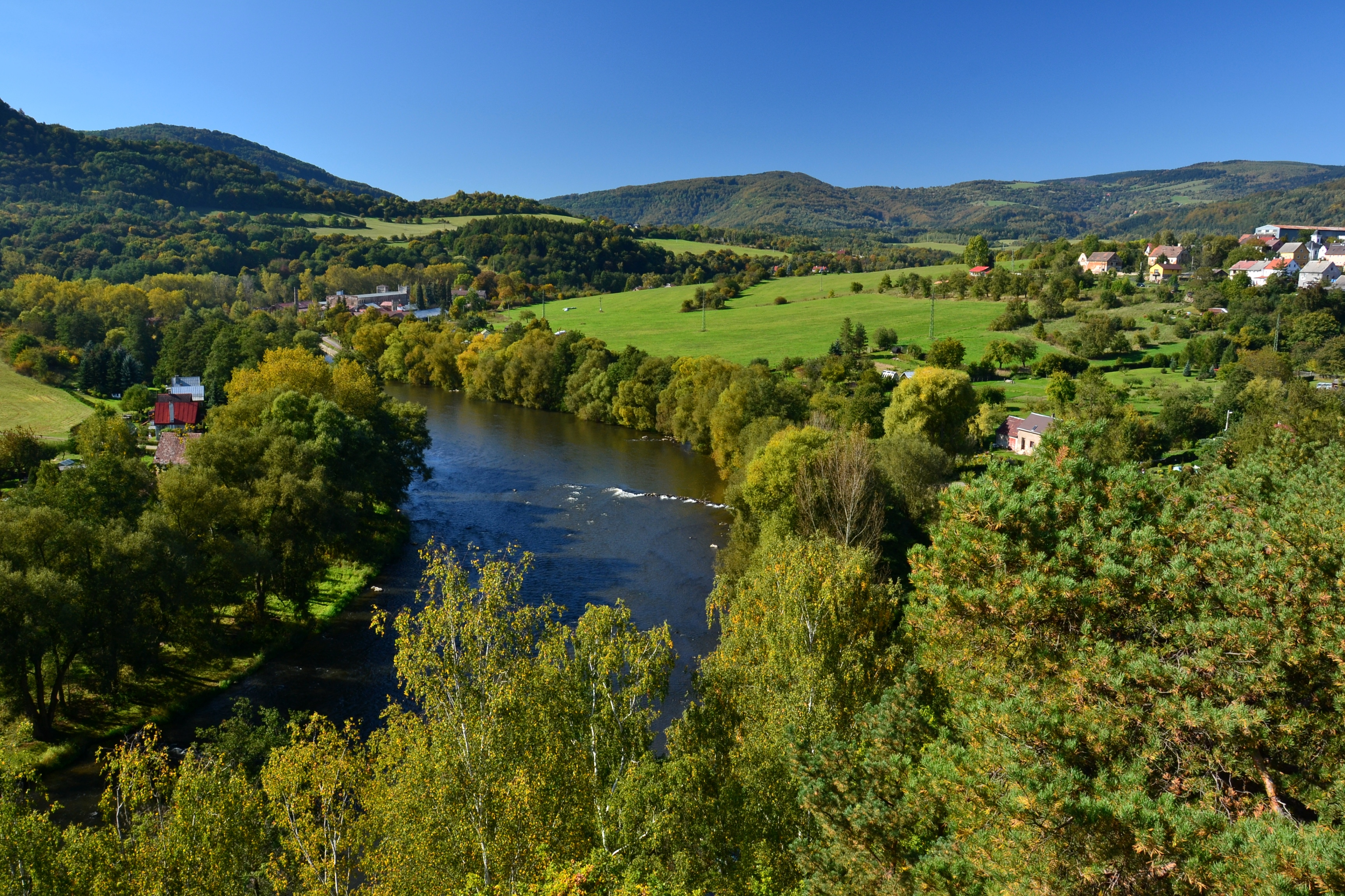 Údolí Ohře pod Černýšem, v pozadí Doupovské a Krušné hory